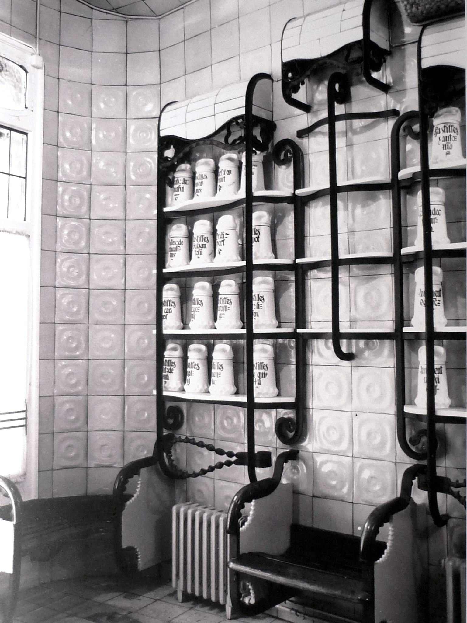 COAC. Reforma d'un local per habilitar-lo com a farmàcia.